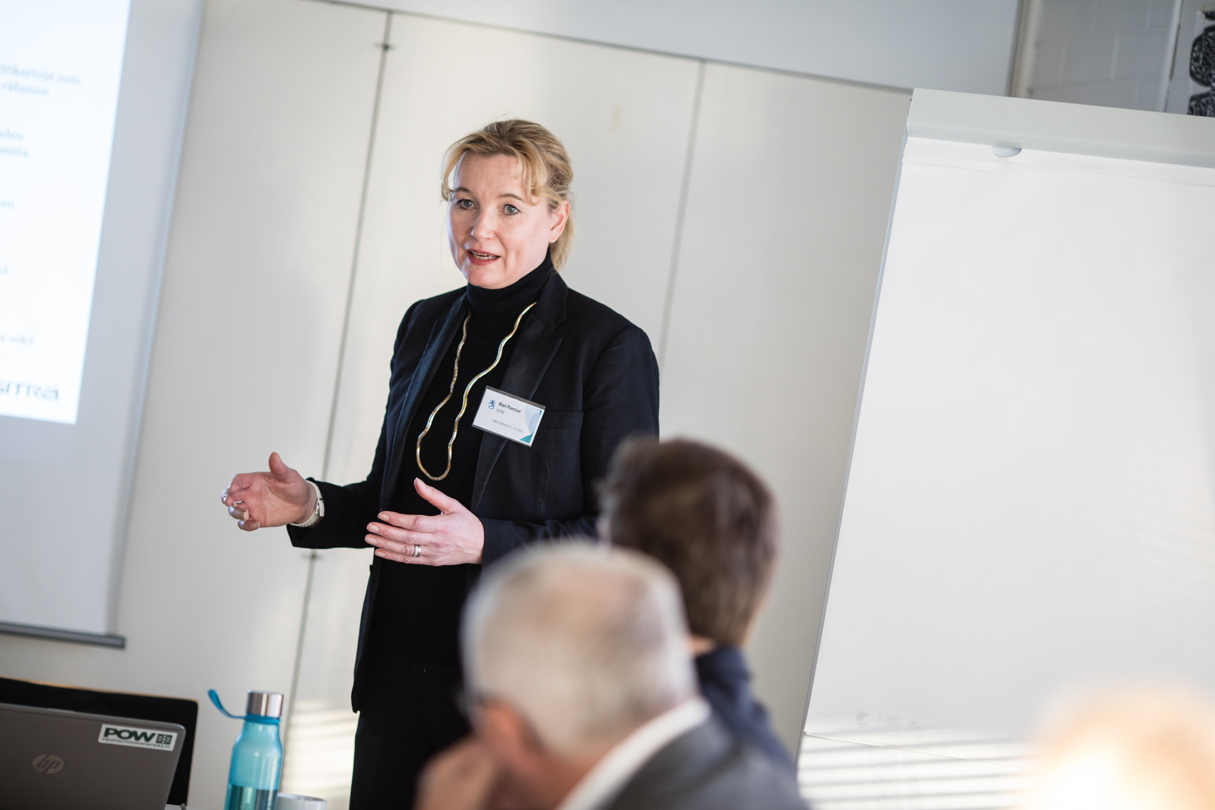 Hallitus ja hallituspuolueiden eduskuntaryhmät kokoontuivat yhteiseen ilmastokokoukseen Helsingin Vuosaareen. © Laura Kotila | valtioneuvoston kanslia